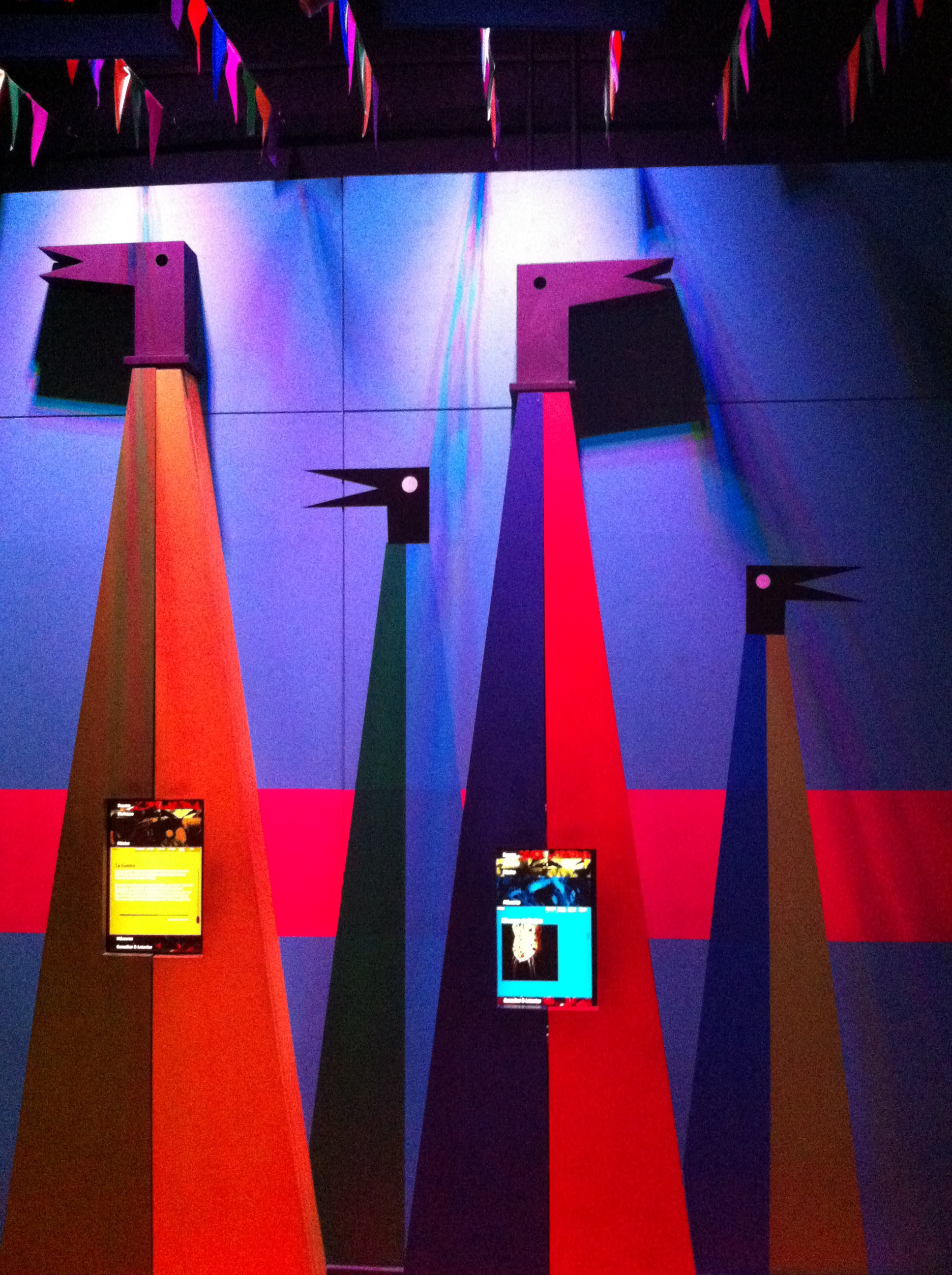 Coyongos - Carnaval de Barranquilla